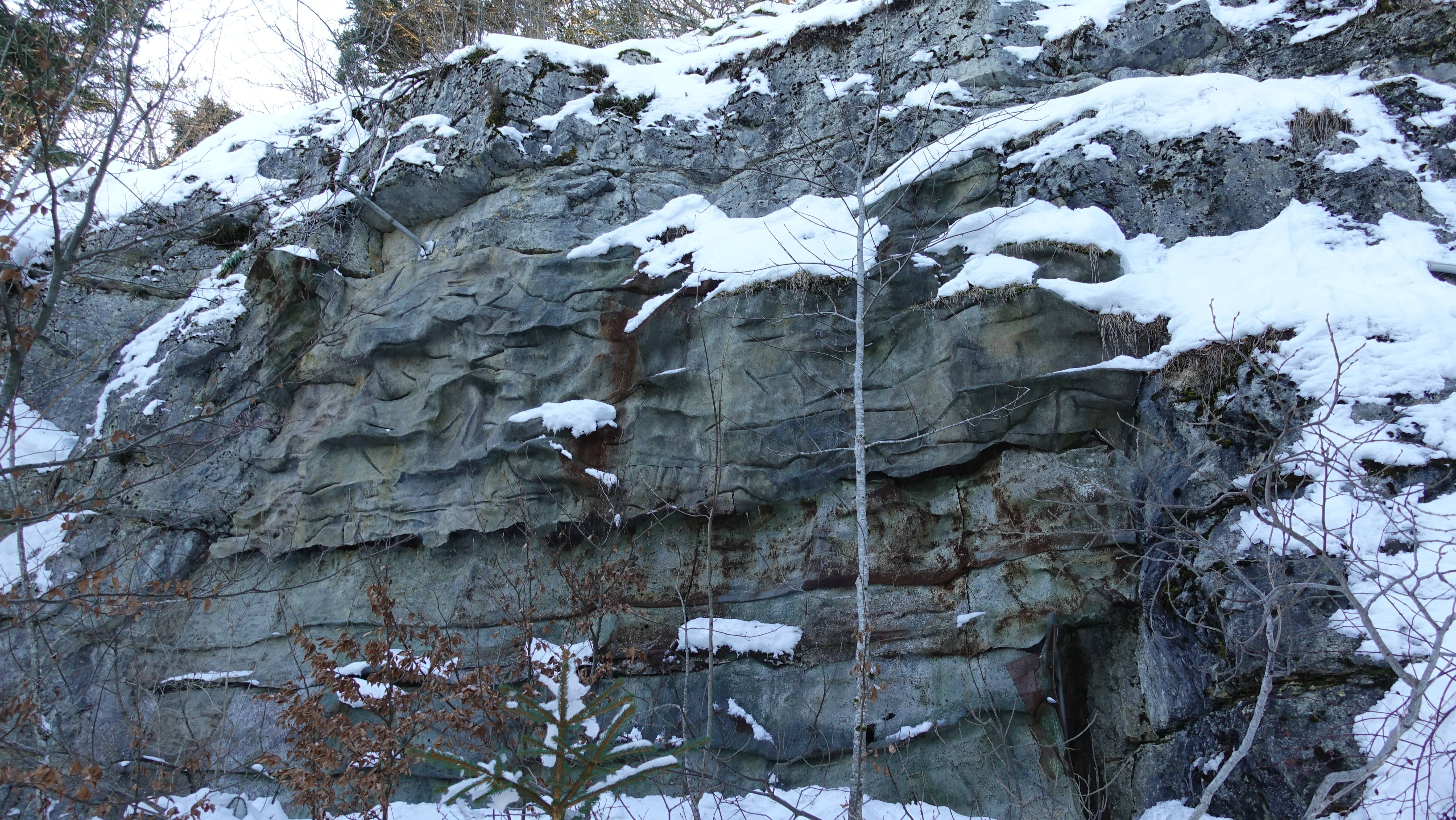 Position de barrage Saint-George